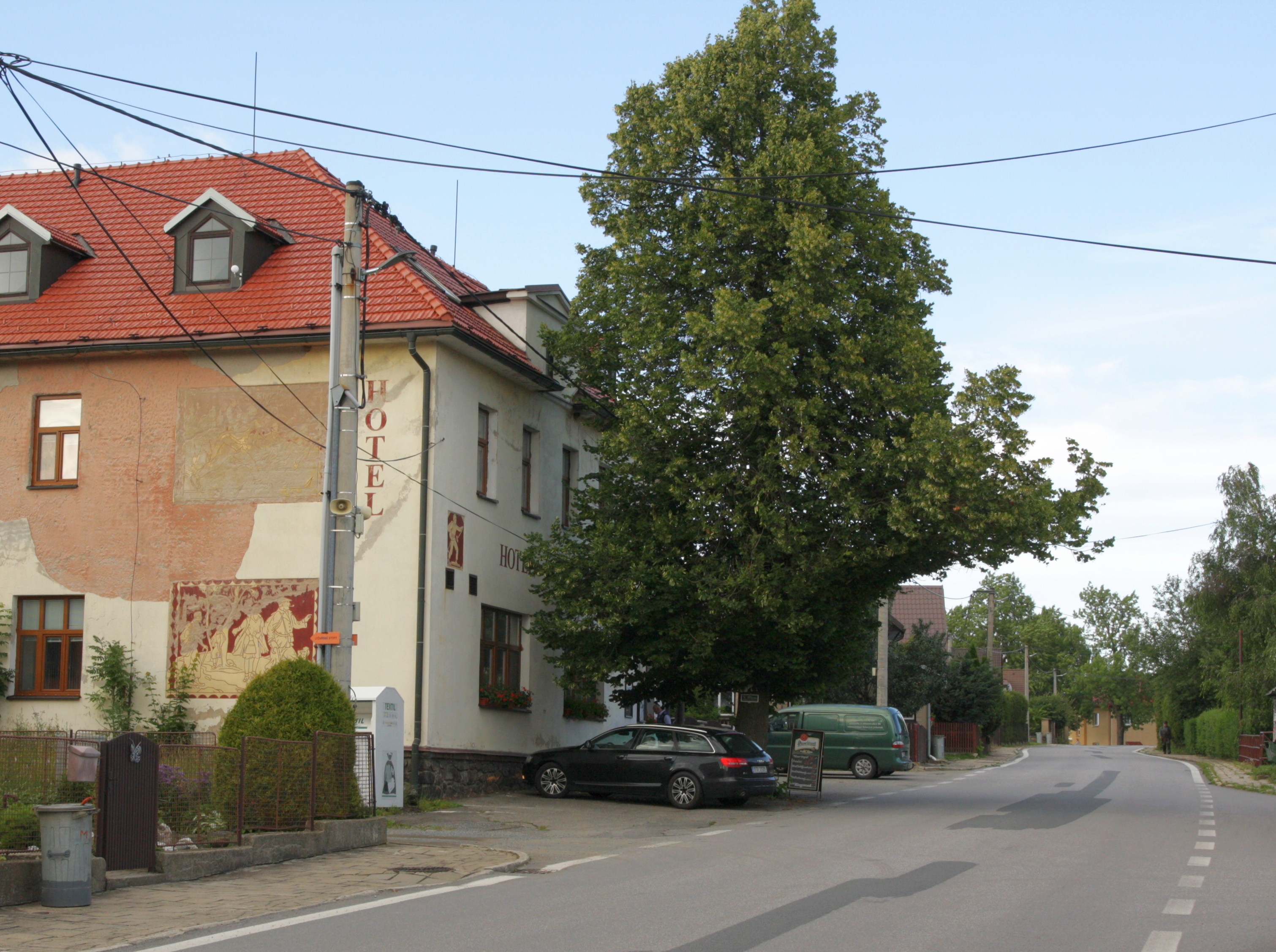 Rokytno (Nové Město na Moravě) - centrum vsi s hotelem